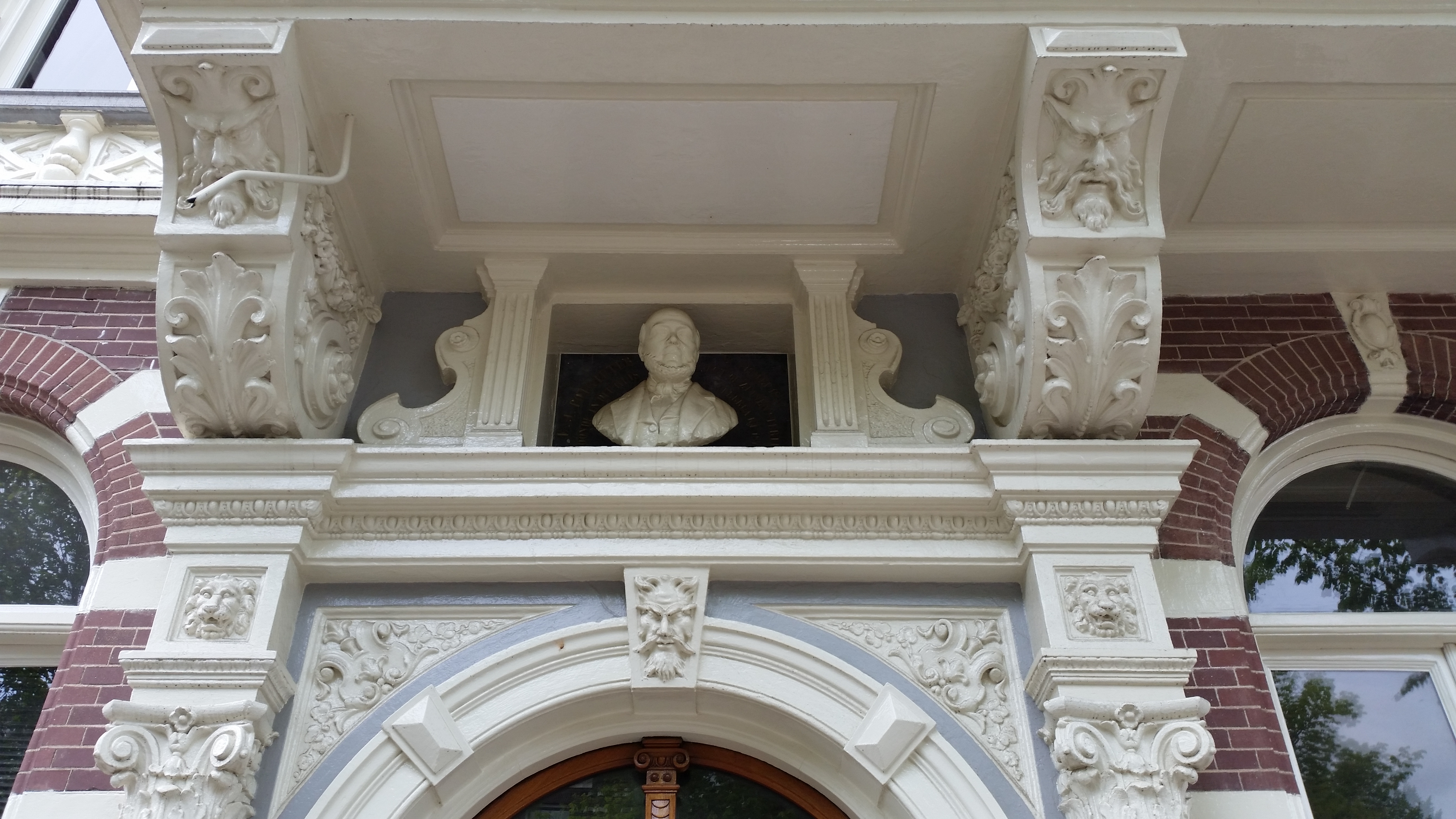 Impressie van het Potgieterhuis, Leliegracht 25, Amsterdam-Centrum met buste van Potgieter van Henri Teixeira de Mattos